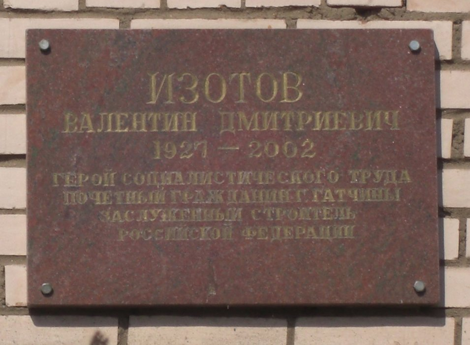 Мемориальная доска в Гатчине, посвящённая Изотову Валентину Дмитриевичу